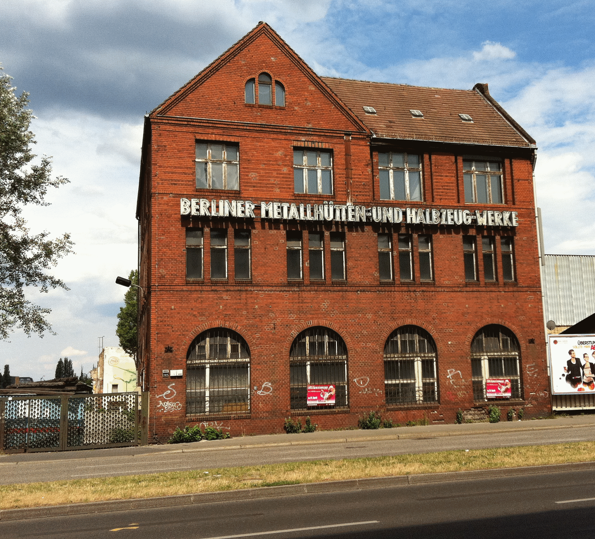 ehemaliges Verwaltungsgebäude des VEB Berliner Metallhütten- und Halbzeugwerke an der Schnellerstraße (leerstehend), trägt noch den Leutschriftzug.